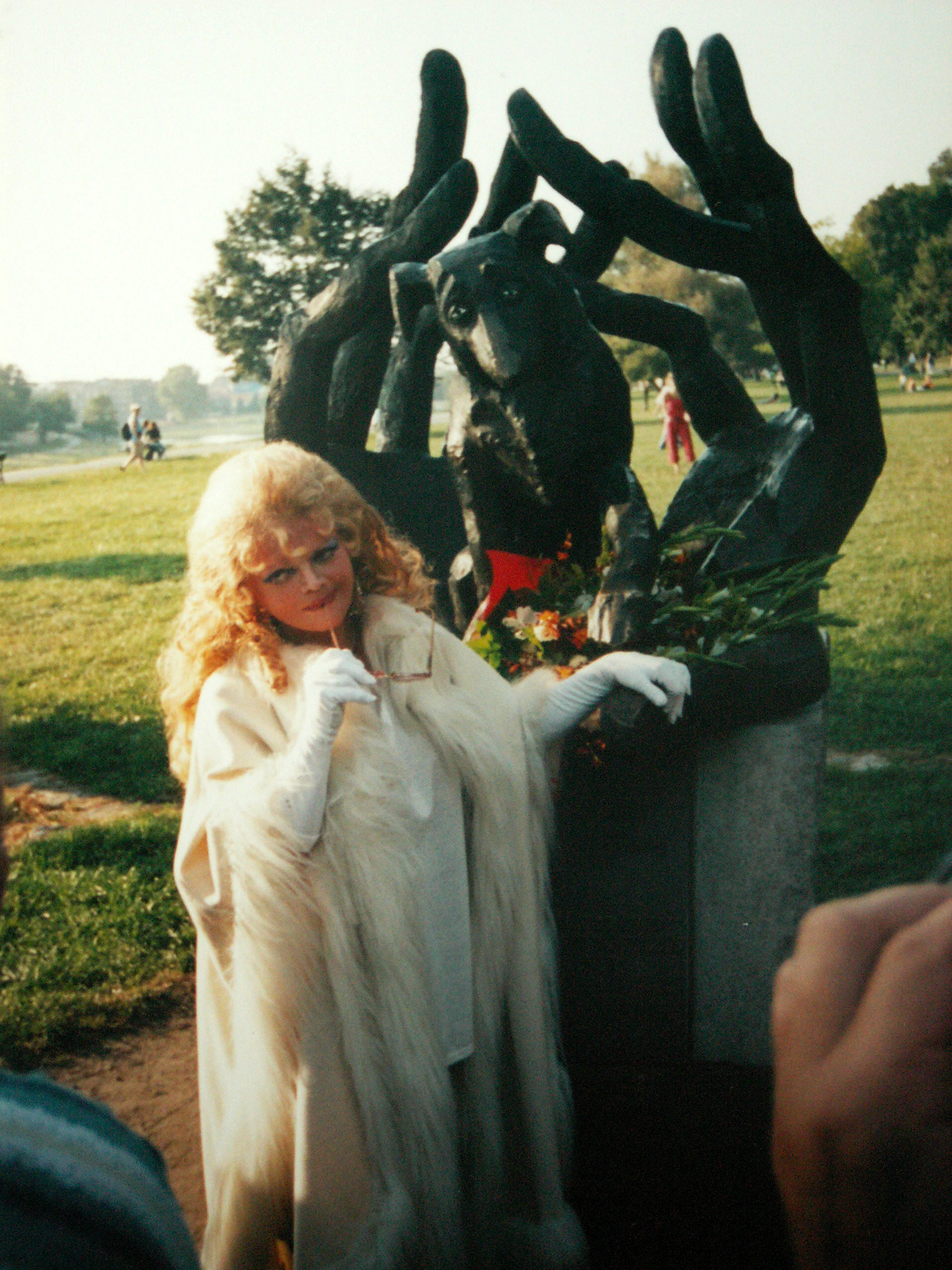 Pod pomnikiem psiej wieroności, Kraków 8 wrzesień 2005r.